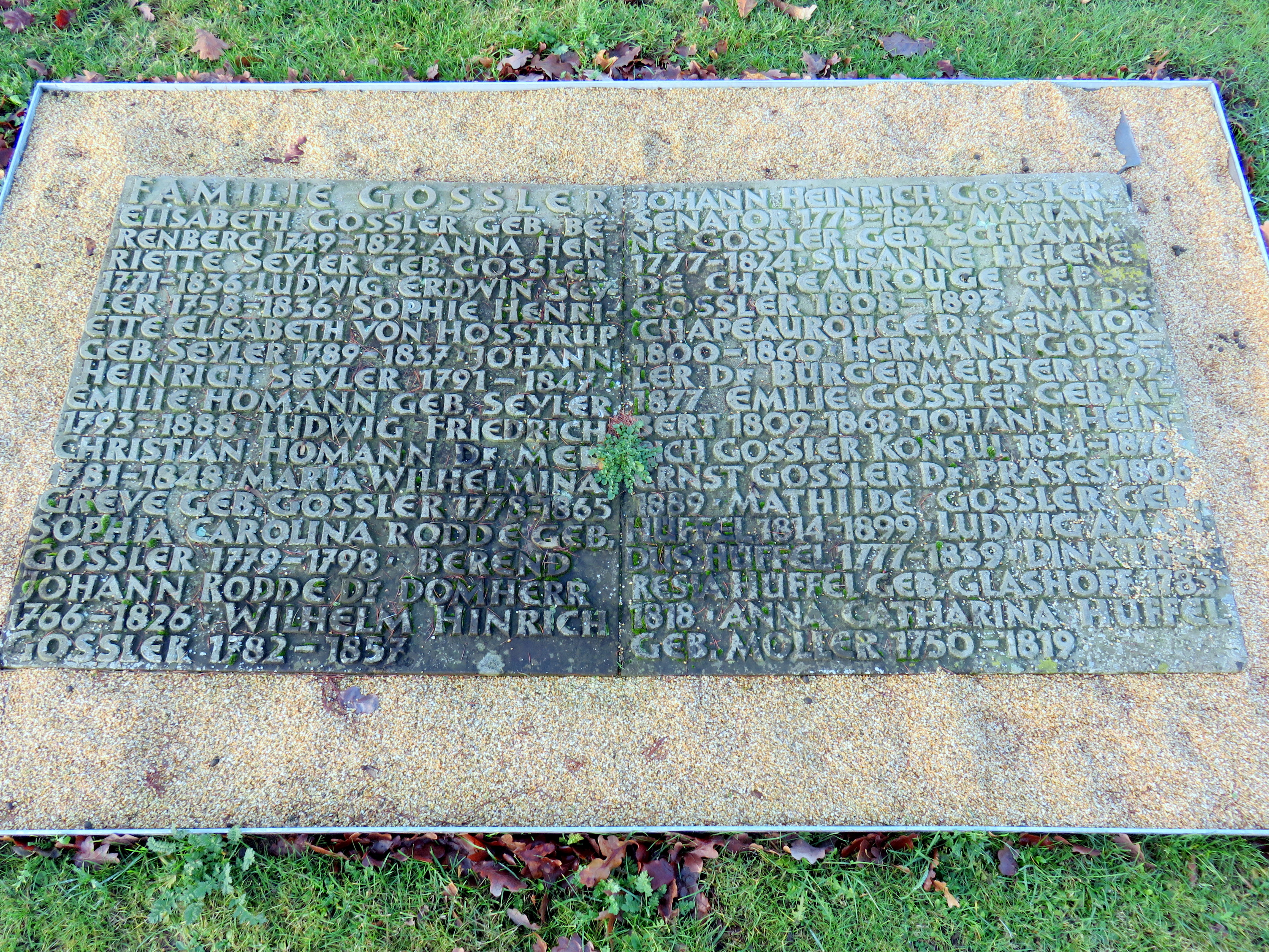 Doppel-Sammelgrab Familie Gossler im Bereich des Althamburgischen Gedächtnisfriedhofs auf dem Hamburger Friedhof Ohlsdorf zu Ehren von unter anderen : Elisabeth Berenberg, Ludwig Erdwin Seyler und seiner Ehefrau Anna Henriette Seyler geborene Gossler, Johann Heinrich Gossler, Hermann Gossler, Ernst Gossler und seiner Ehefrau Mathilde Gossler geborene Hüffel.